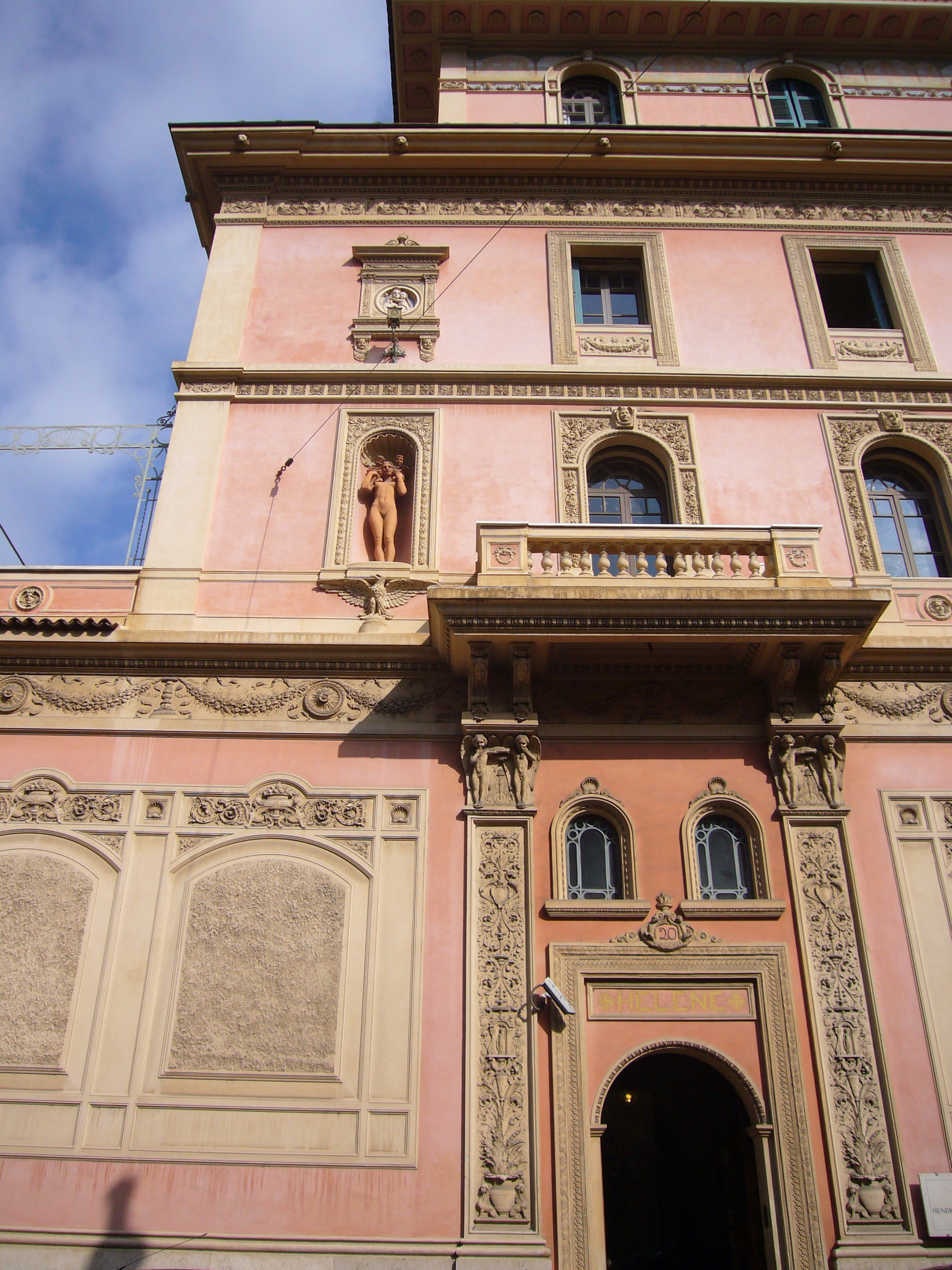 Roma, Museo Hendrik Christian Andersen (via Pasquale Stanislao Mancini)